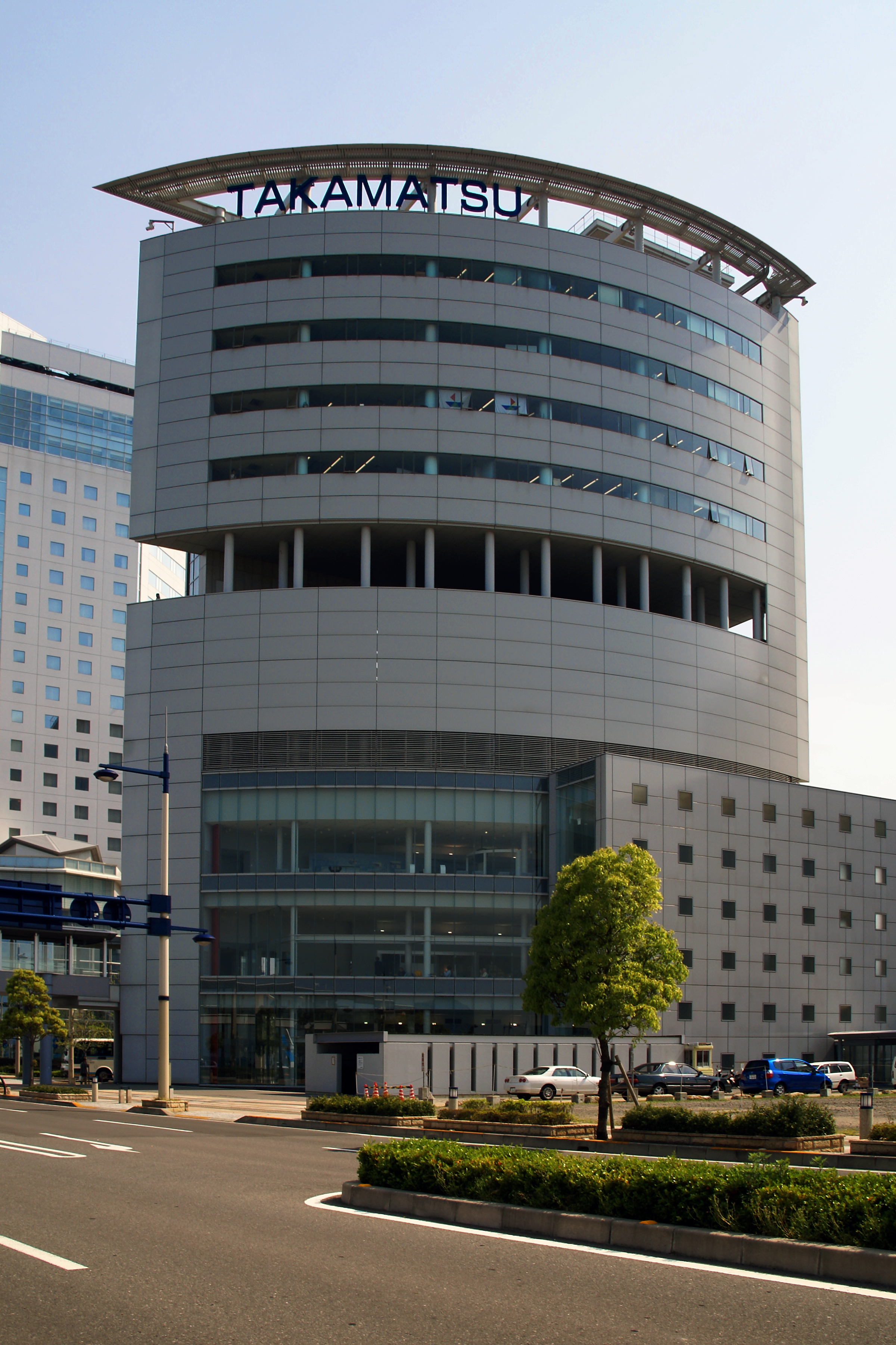 Takamatsu Port Passenger Terminal Building of Sunport-Takamatsu in Takamatsu, Kagawa, Japan